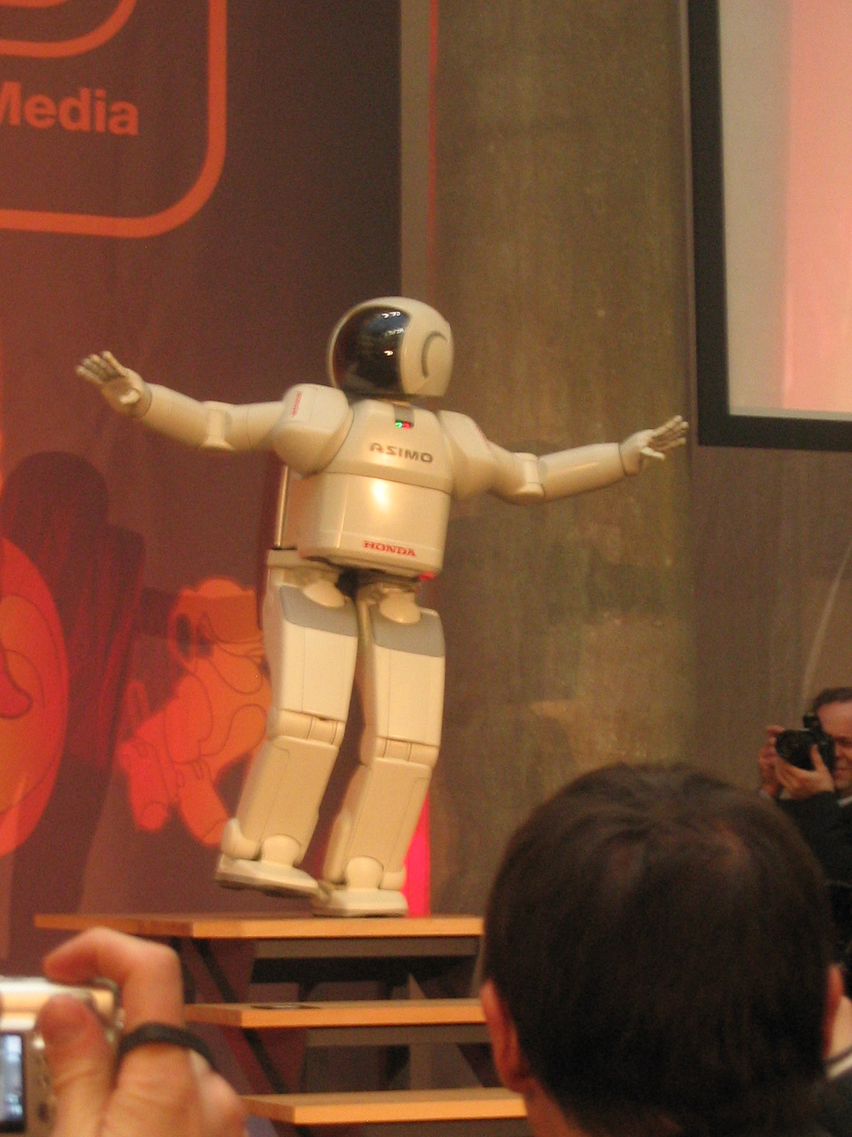 Asimo at the Digital Lifestyle Day 2006, MunichDLD06: Asimo, einbeinig